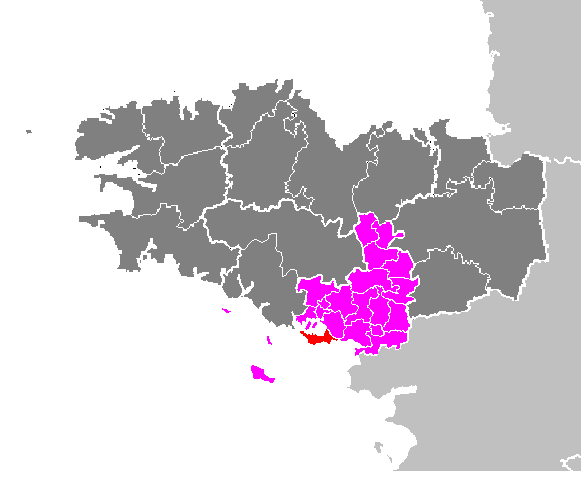 Maps of arrondissements and cantons of France: Arrondissement de Vannes - Canton de Sarzeau.PNG